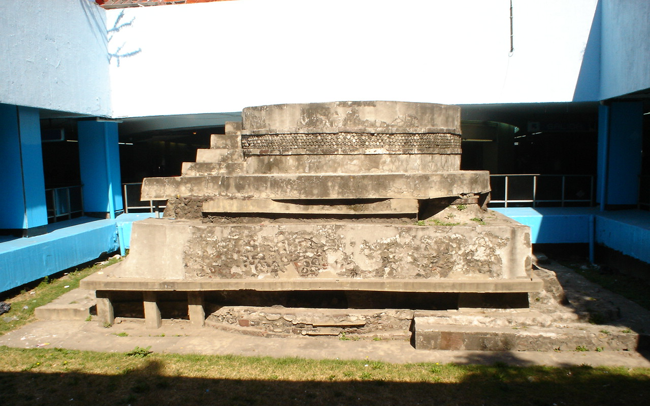 MONUMENTO A EHÉCATL (DIOS DEL VIENTO DE LA MITOLOGIA AZTECA)